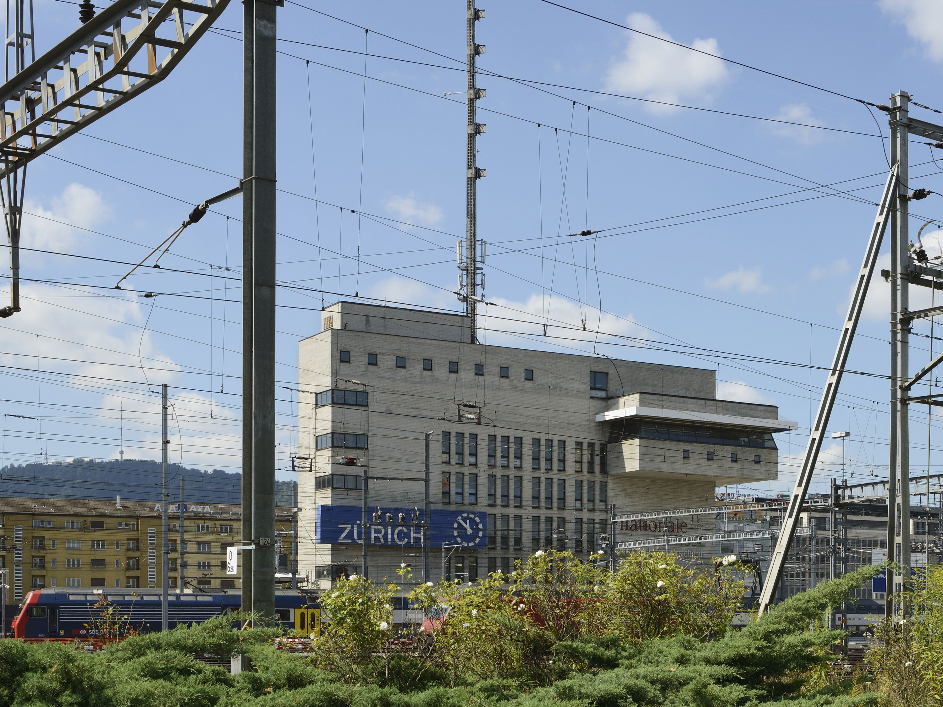 Zürich Hauptbahnhof, Zentrallstellwerk, 1960-1963 erbaut von Max Vogt